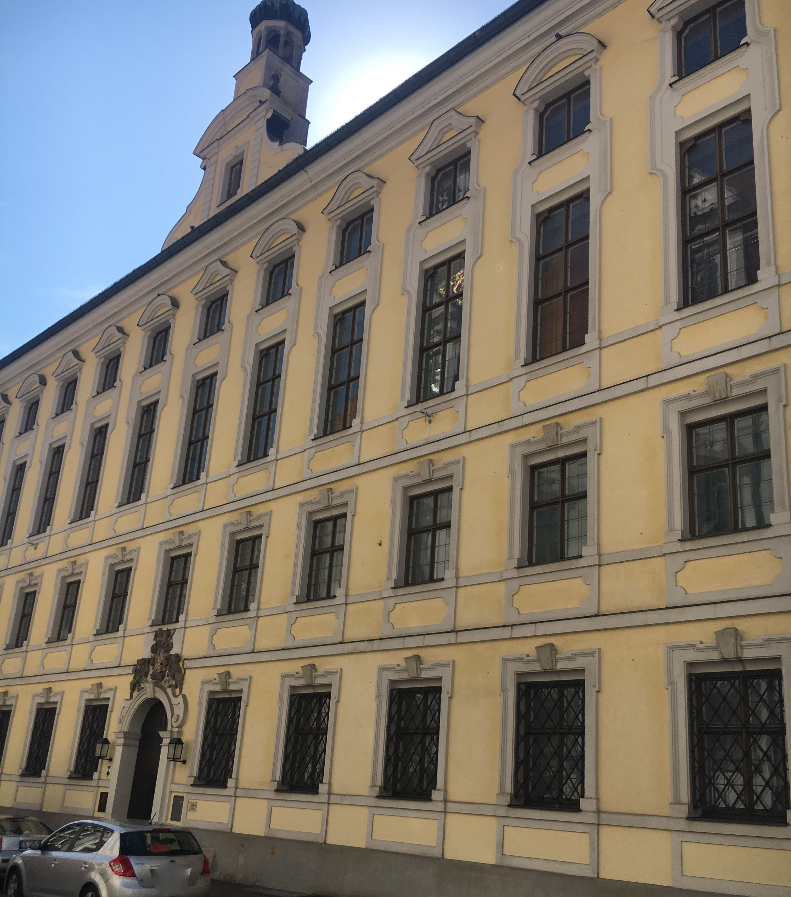 Vorderfront der Studienbibliothek in Dillingen/Donau